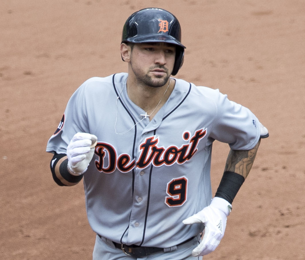 Tigers at Orioles 8/6/17